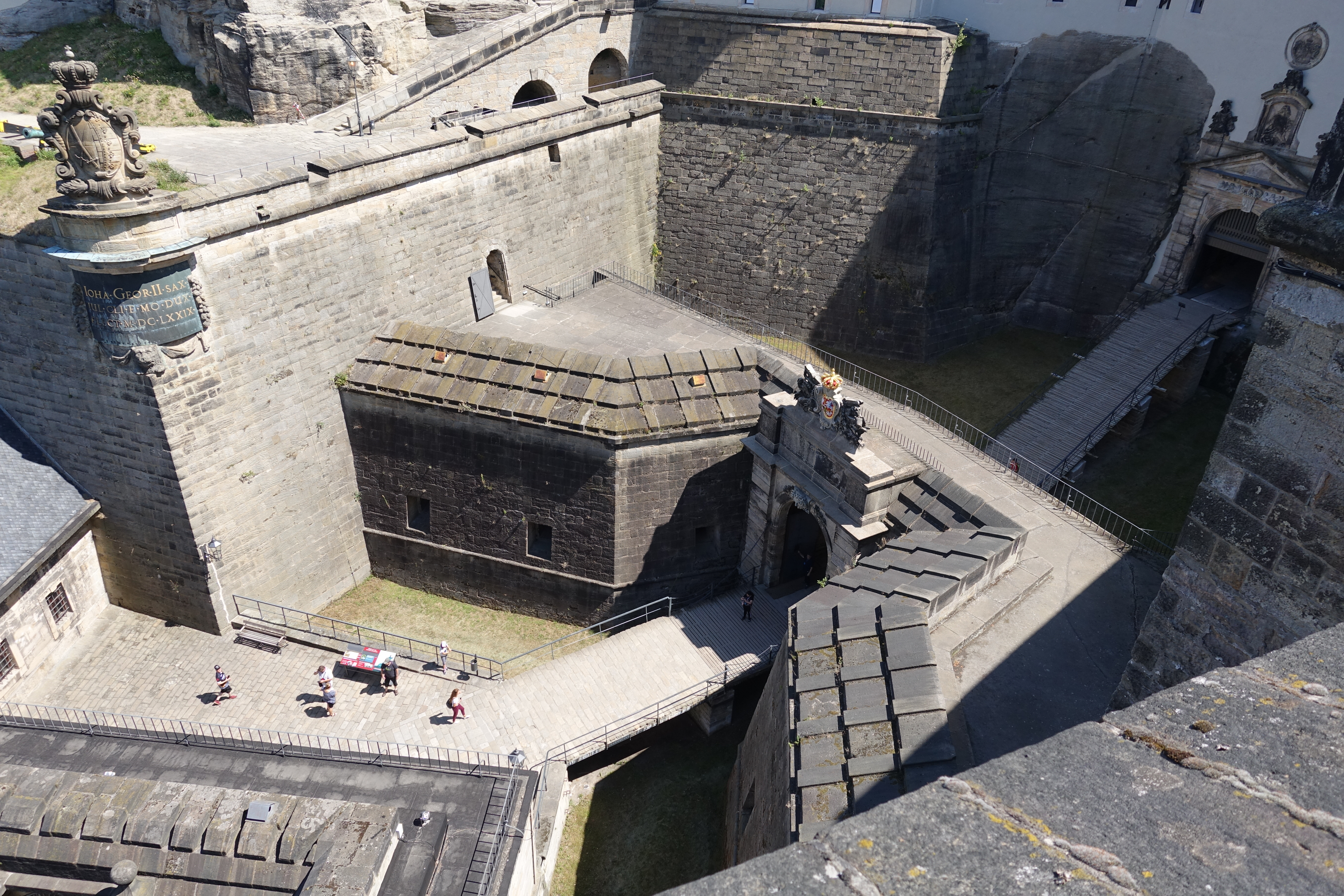 Festung Königstein in Sachsen, Toranlage 16. bis 18. Jahrhundert (oben Johann-Georgen-Bastei, Mitte: Vorwerke um 1730)